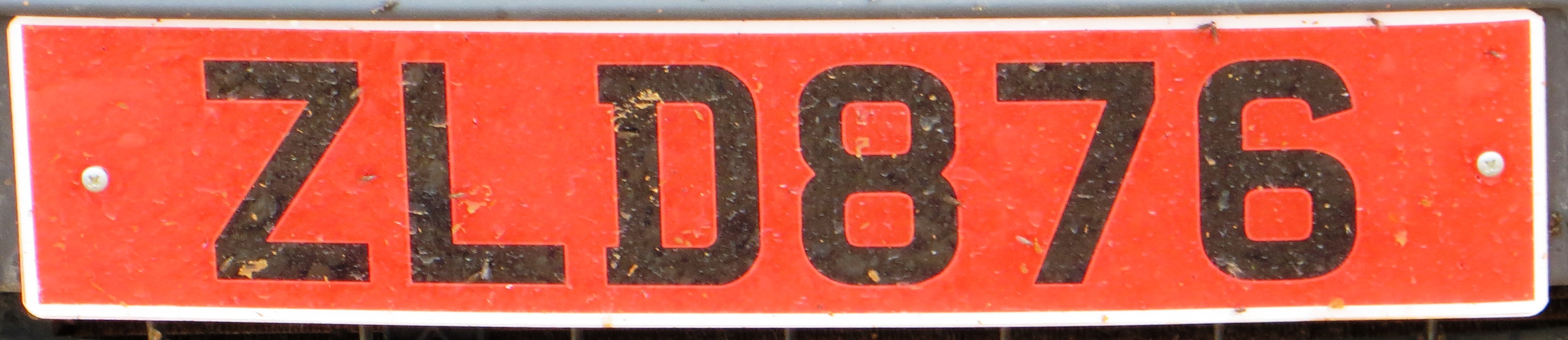 CD kenteken plaat van Noord Cyprus